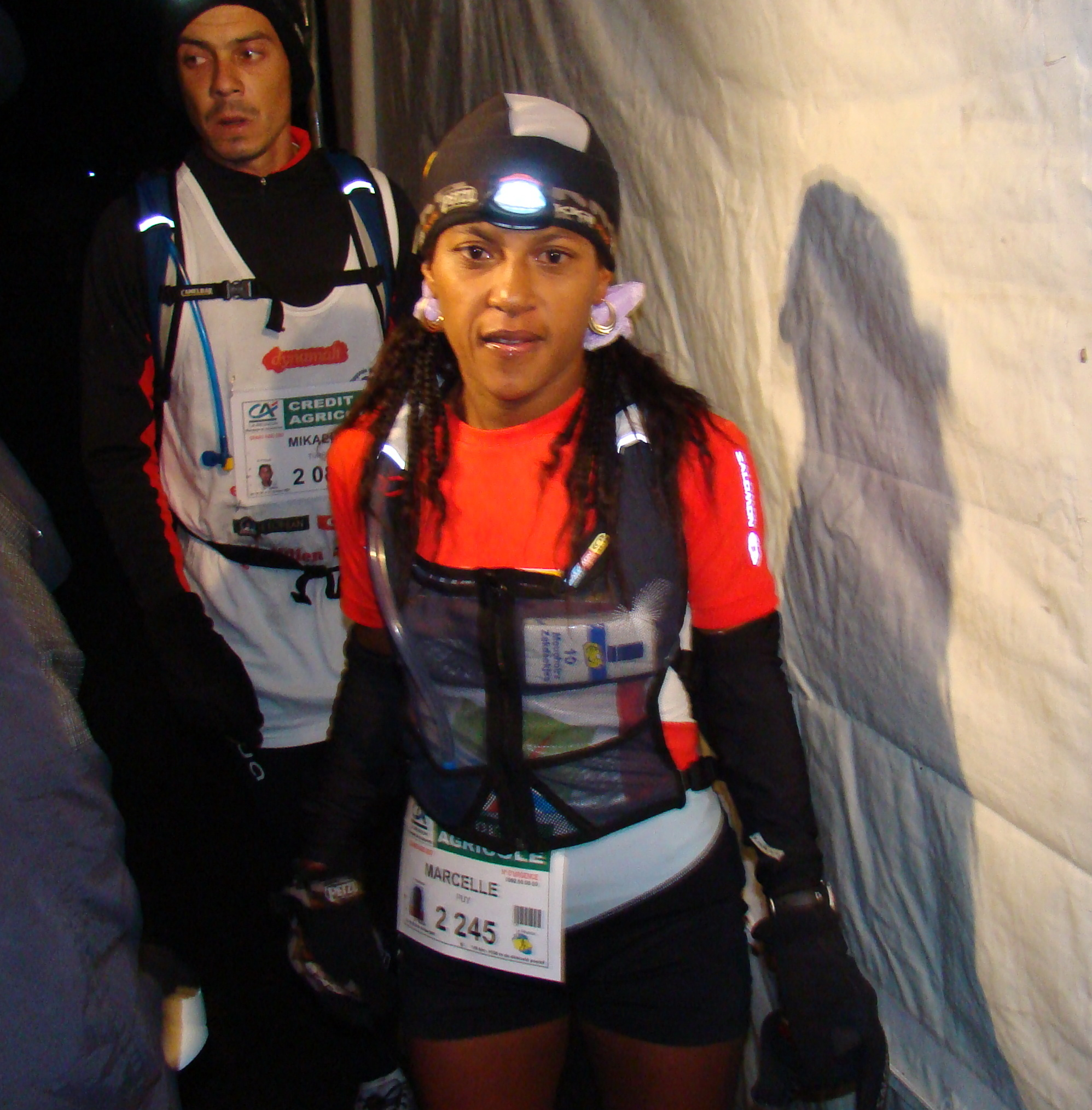 Marcelle PUY, Grand Raid 2007